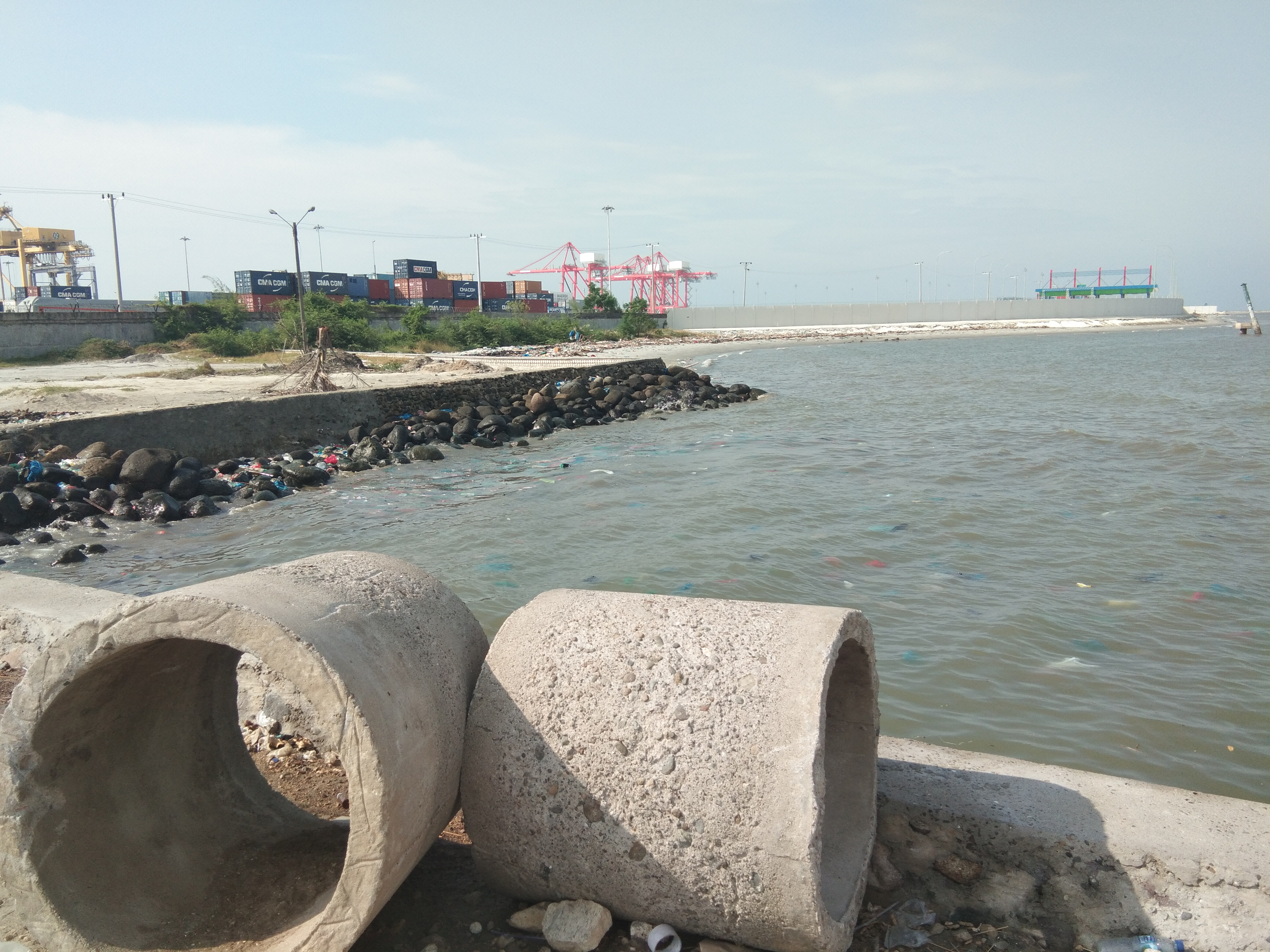 Gambar diambil dari pantai olo